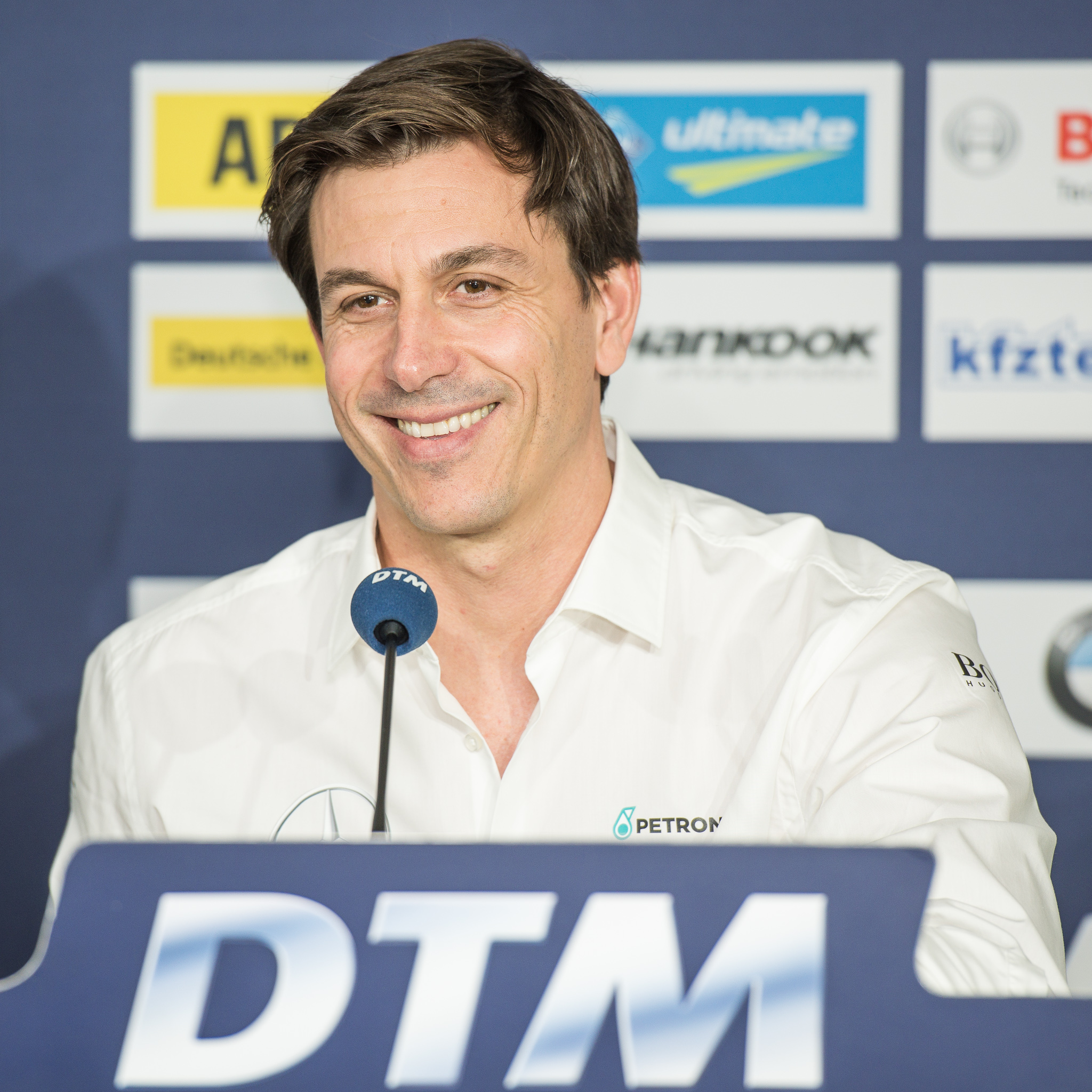 DTM,Deutsche Tourenwagen Masters,Hockenheimring,Motorsport,Pressekonferenz,Torger Christian Wolff,Toto Wolff